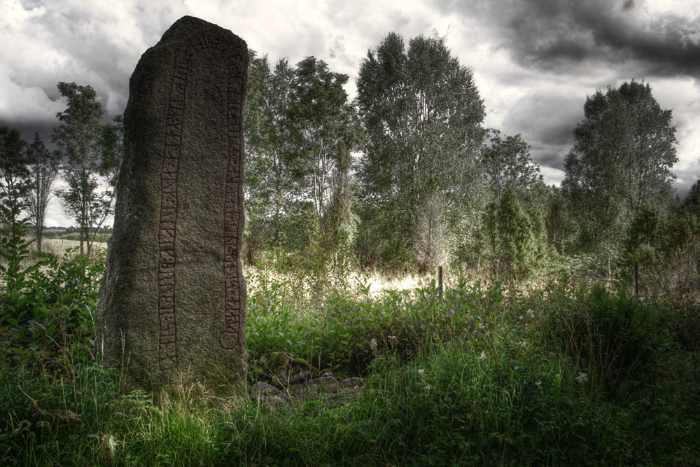 HDR-Aufnahme mit anschließendem TM aus einer 5er-Belichtungsserie des Runenstein Kårestad. "Klackes söner läto hugga stenen efter sin fader och efter Kale och Viking, sina bröder." "Klackes Söhne ließen diesen Stein ritzen für ihren Vater und für Kale und Viking, ihre Brüder." Der Runenstein steht wahrscheinlich auf seinem ursprünglichen Platz und ist ein Gedenk- und kein Grabstein. Die Todesursache der 3 Männer ist unbekannt, ebenso der Name des Vaters. Das man den Namen Viking bekommen konnte zeigt, dass das Wort Wikinger eine positive Bedeutung hat. Dieser Name kommt auf über zwanzig Runensteinen vor. Rundata Sm 11.